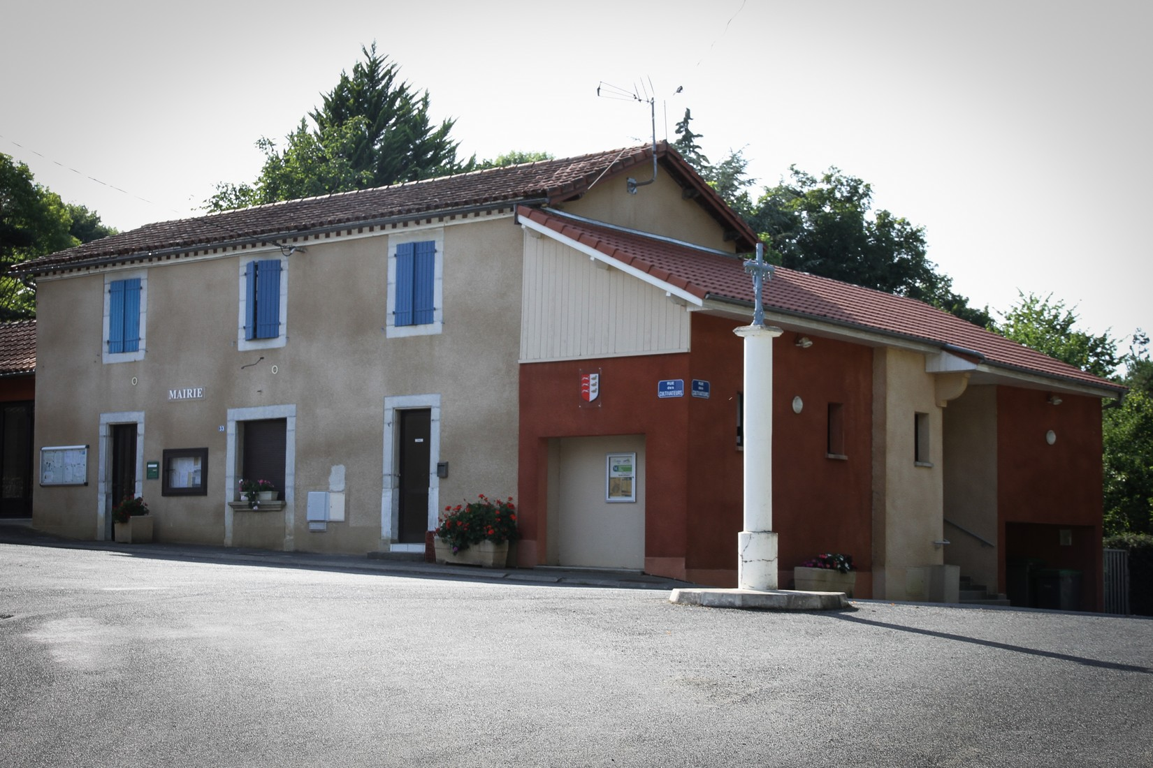 Mairie